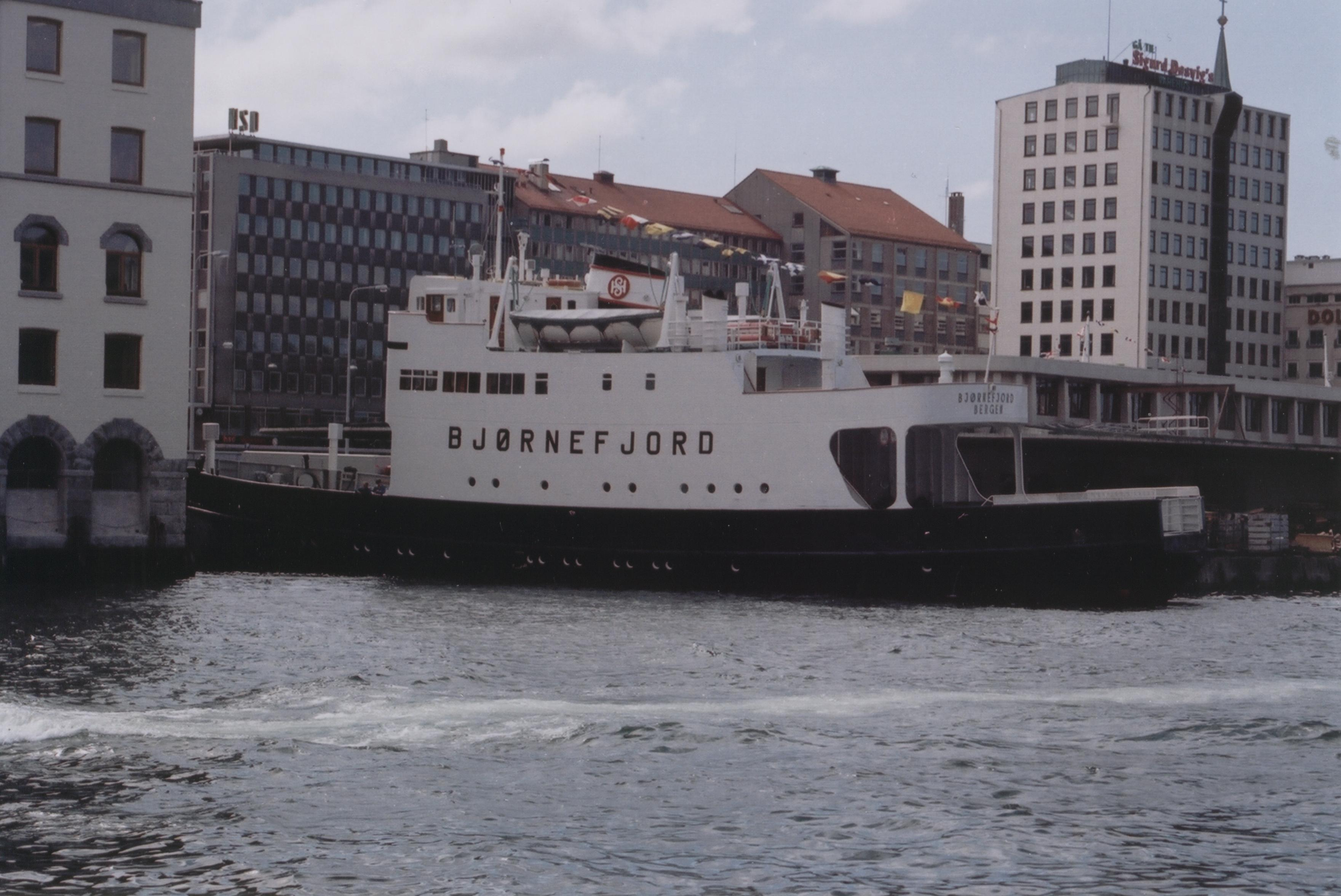 M/F Bjørnefjord built 1962.